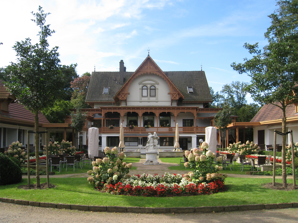 Meierei in Bremen.Das abgebildete Objekt ist ein geschütztes Kulturdenkmal in der Freien Hansestadt Bremen, mit der Nr. 0218,T004 beim Landesamt für Denkmalpflege registriert.